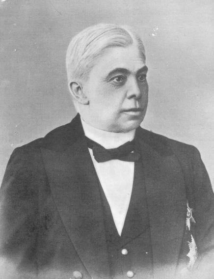 Член департамента гражданских и духовных дел Государственного совета, вице-председатель Иван Яковлевич Голубев (портрет) (репродукция с печатного издания)